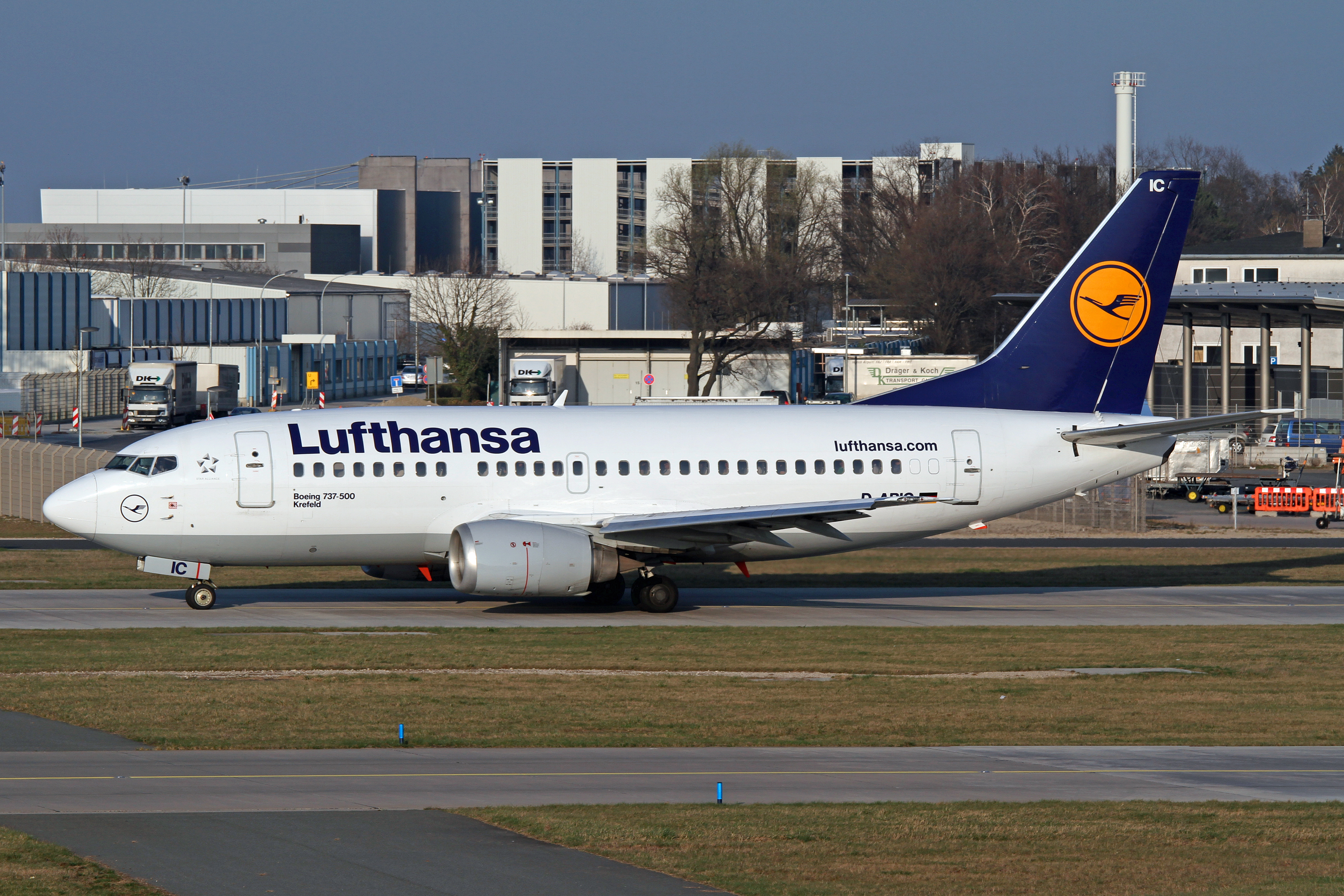 IMG_6251X